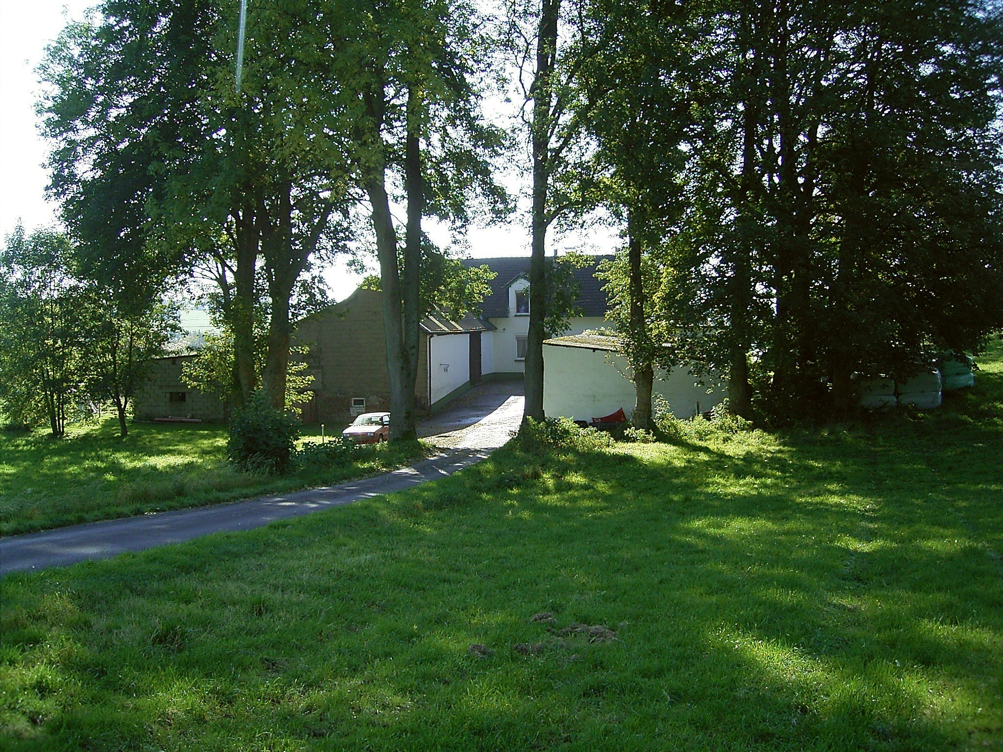 Radevormwald